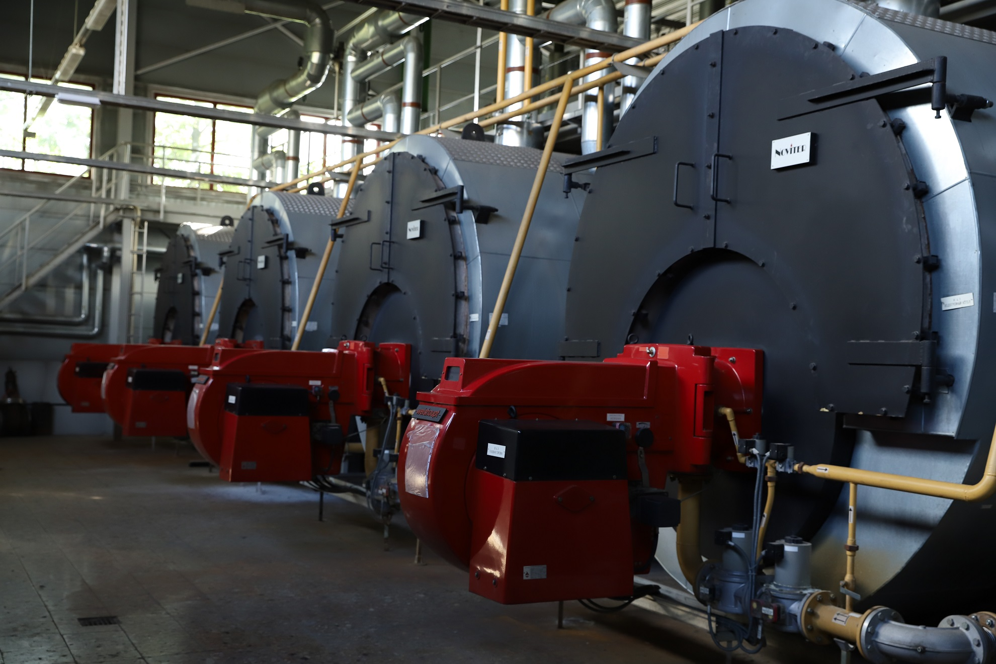 Сучасні котли на котельній вул. Пулюя, 5в